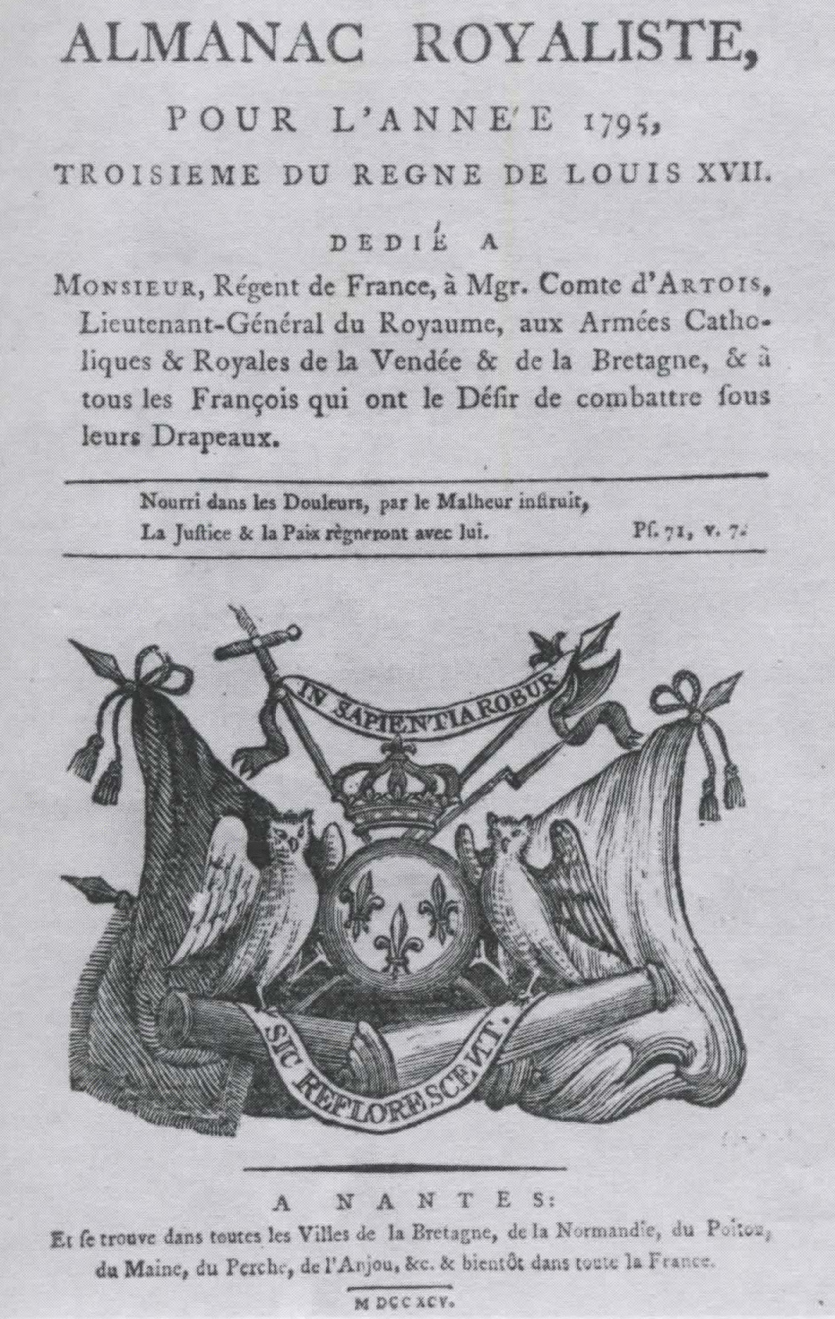 Almanac royaliste